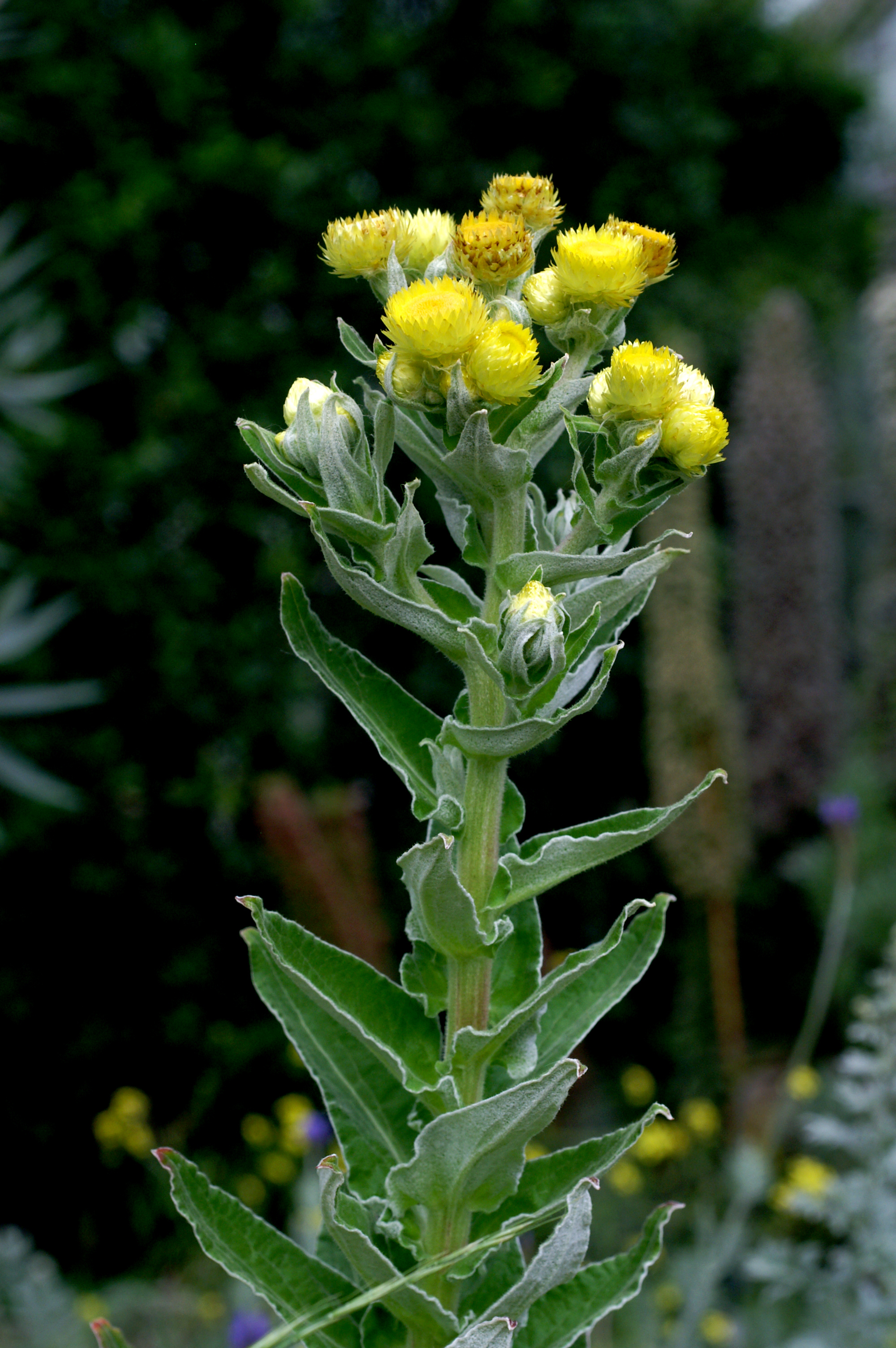 Blütenstand der Stinkenden Strohblume (Helichrysum foetidum), Botanischer Garten Berlin